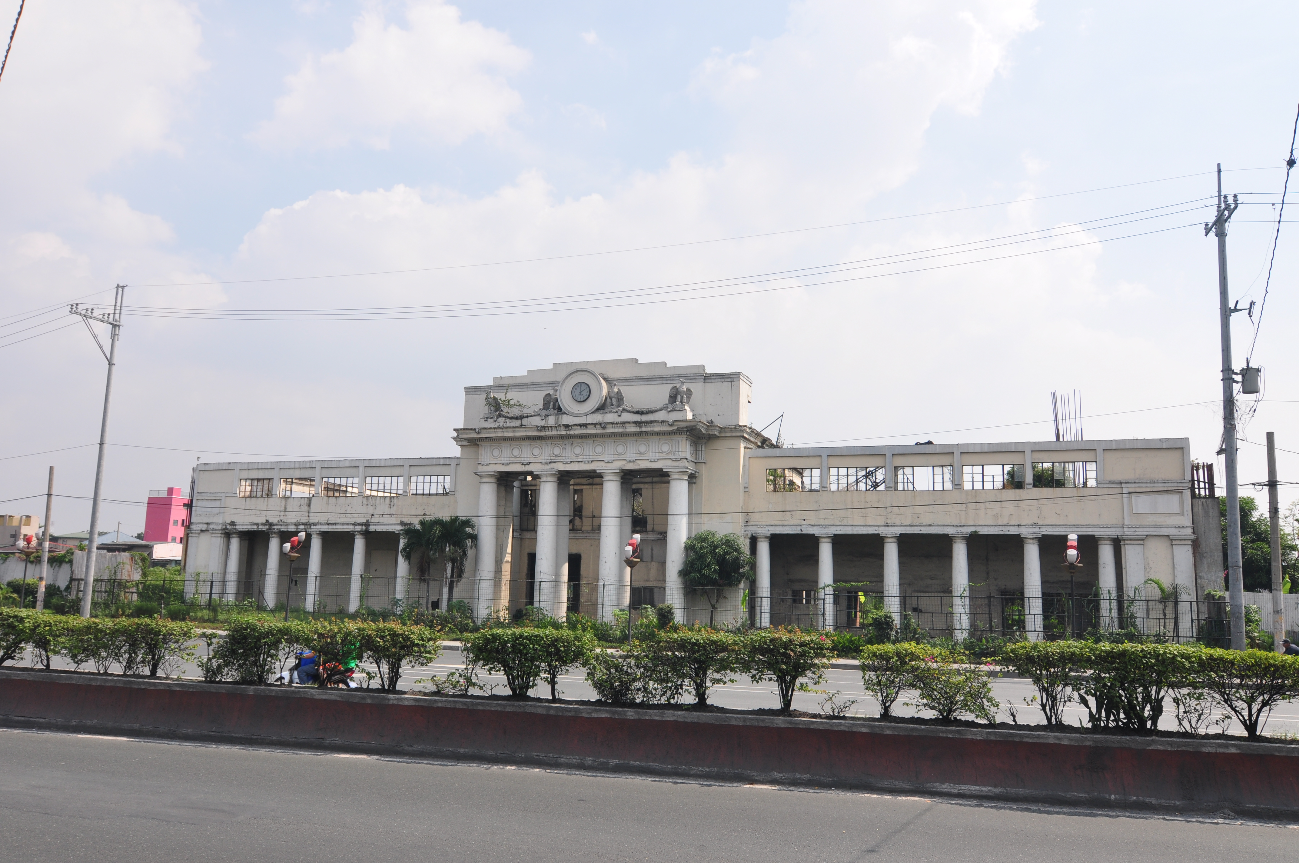 Old Paco railway station in Manila, Philippines